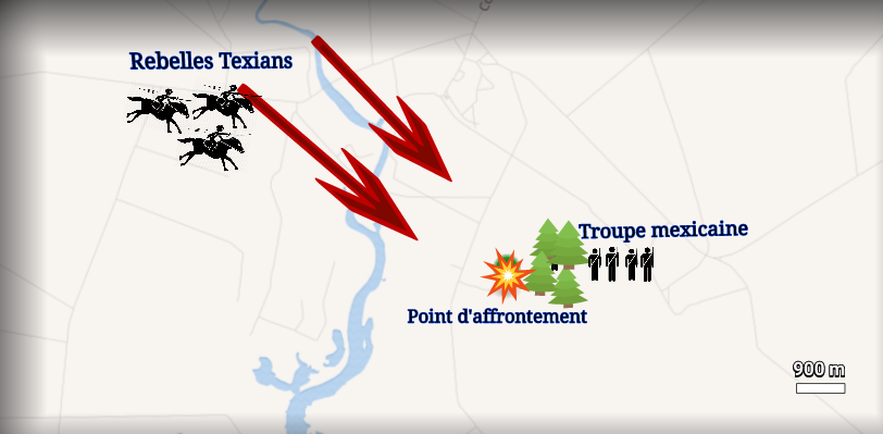 Carte de la bataille d'Agua Dulce.